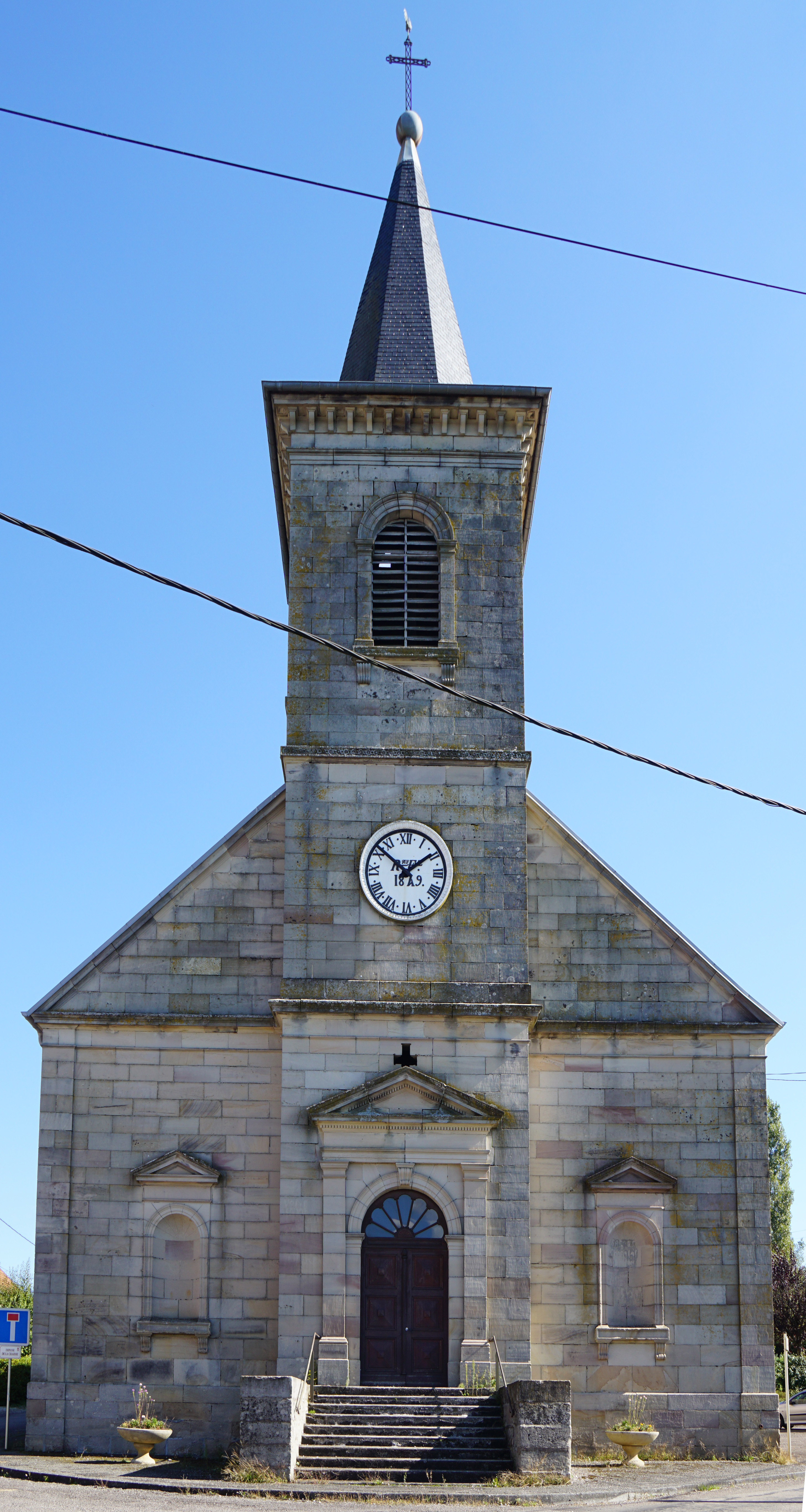 L'église Saint-Vaudre de Franchevelle.